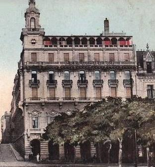 Edificio del Palace Hotel y Compañía Naviera Nicolás Mihanovich, en Buenos Aires. Actual sede de la Facultad de Filosofía de la Univ. de Buenos Aires.